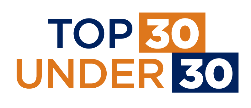 Логотип щорічної нагороди TOP 30 UNDER 30